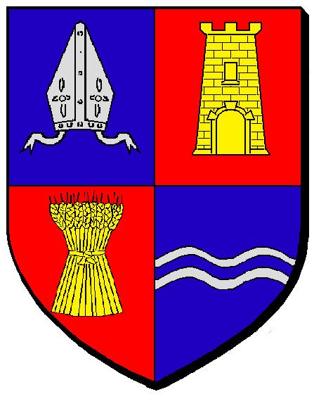 Comme le certifie le site web de la commune d'Alquines, voici le blason utilissé